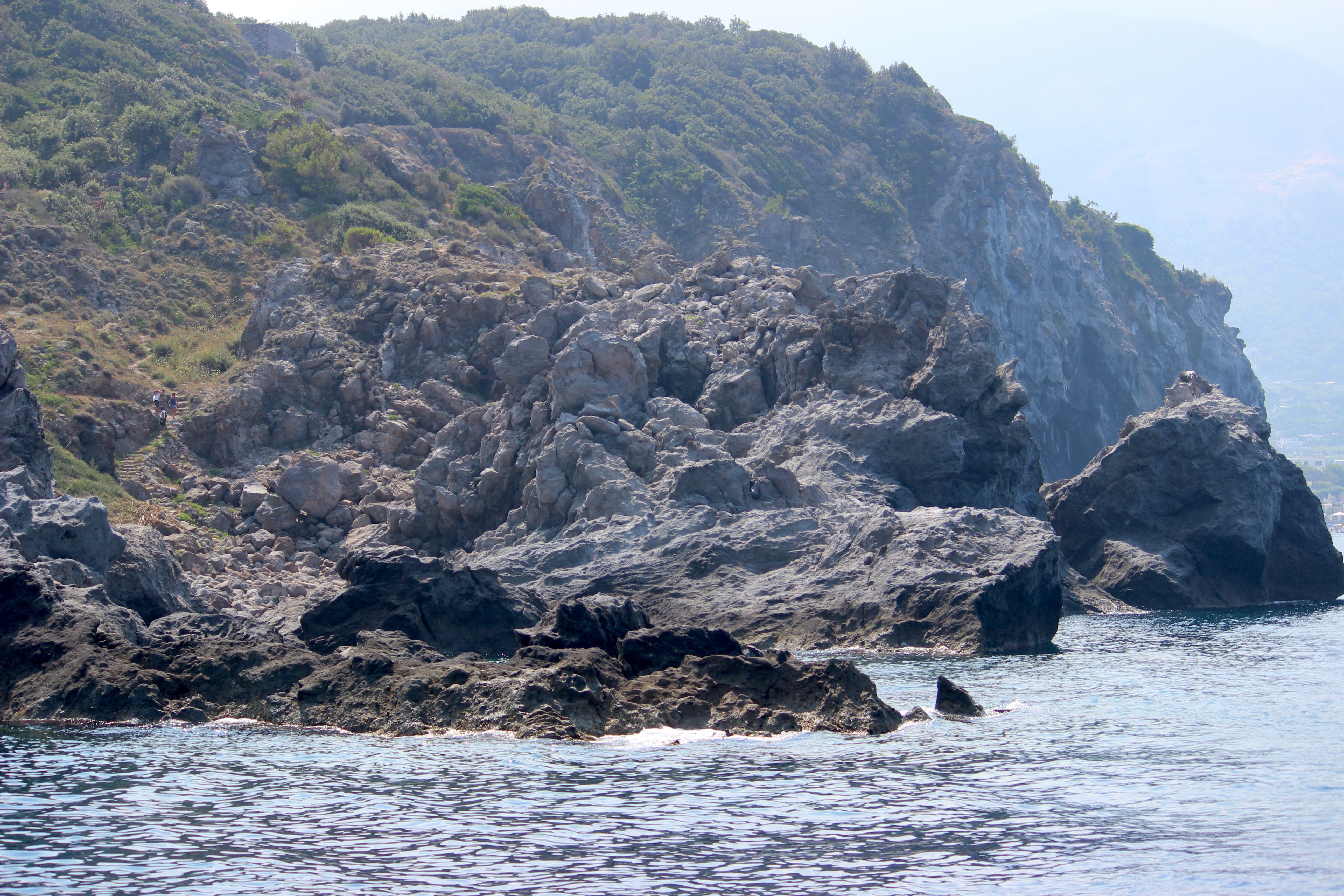 Ischia desde el barco de Ischia Porto a Forio.